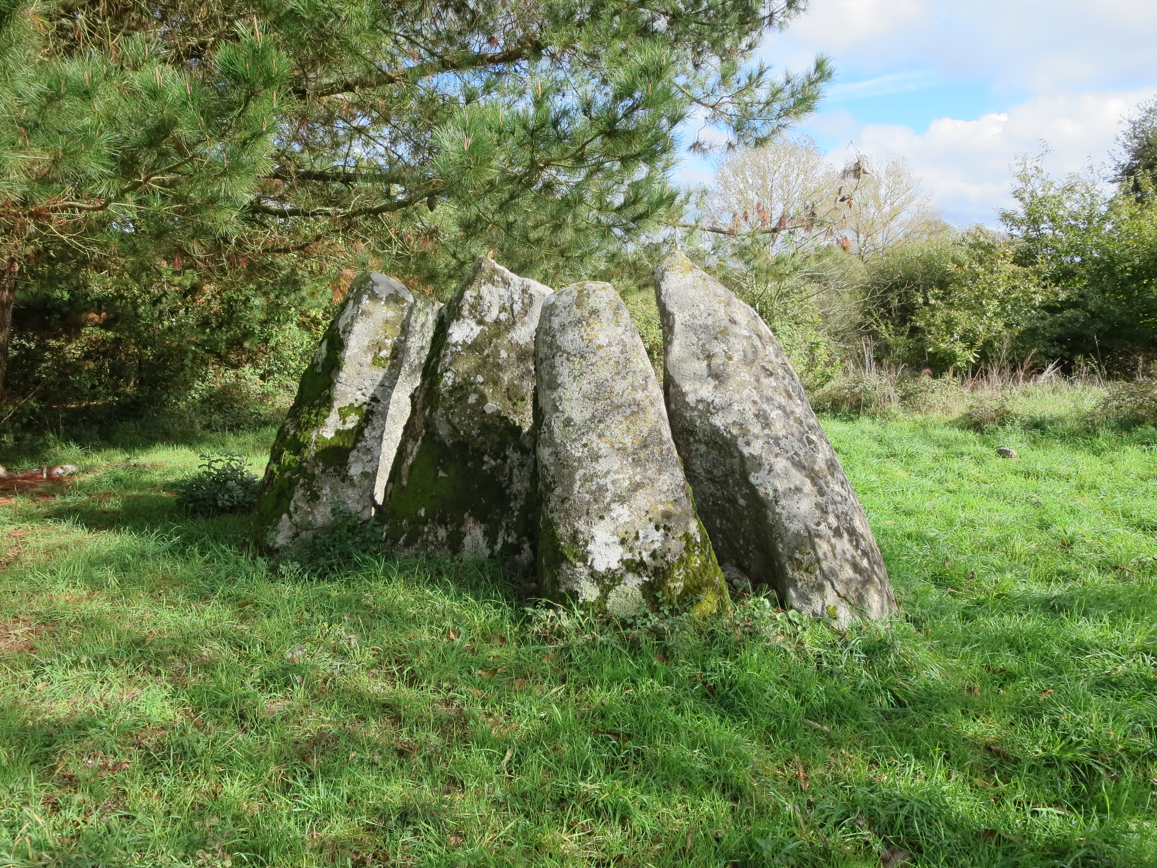 Anta de Abuíme, o día 13 de novembro de 2014